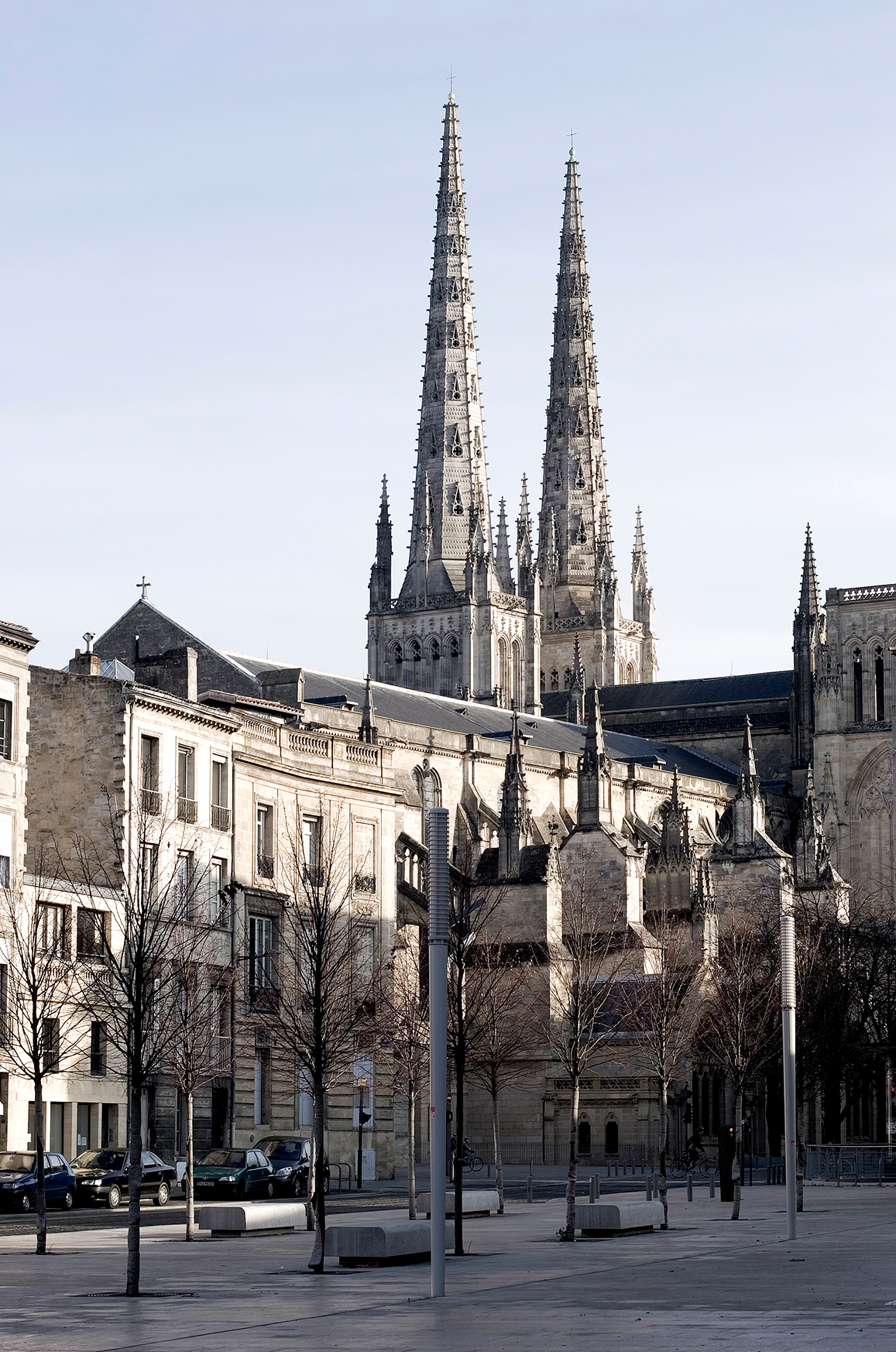 Rue des Frères Bonie in Bordeaux, France.